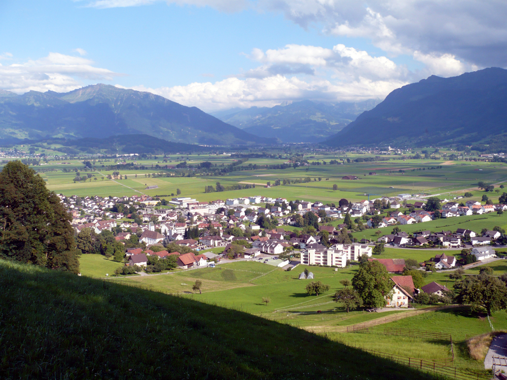 Tuggen SZ